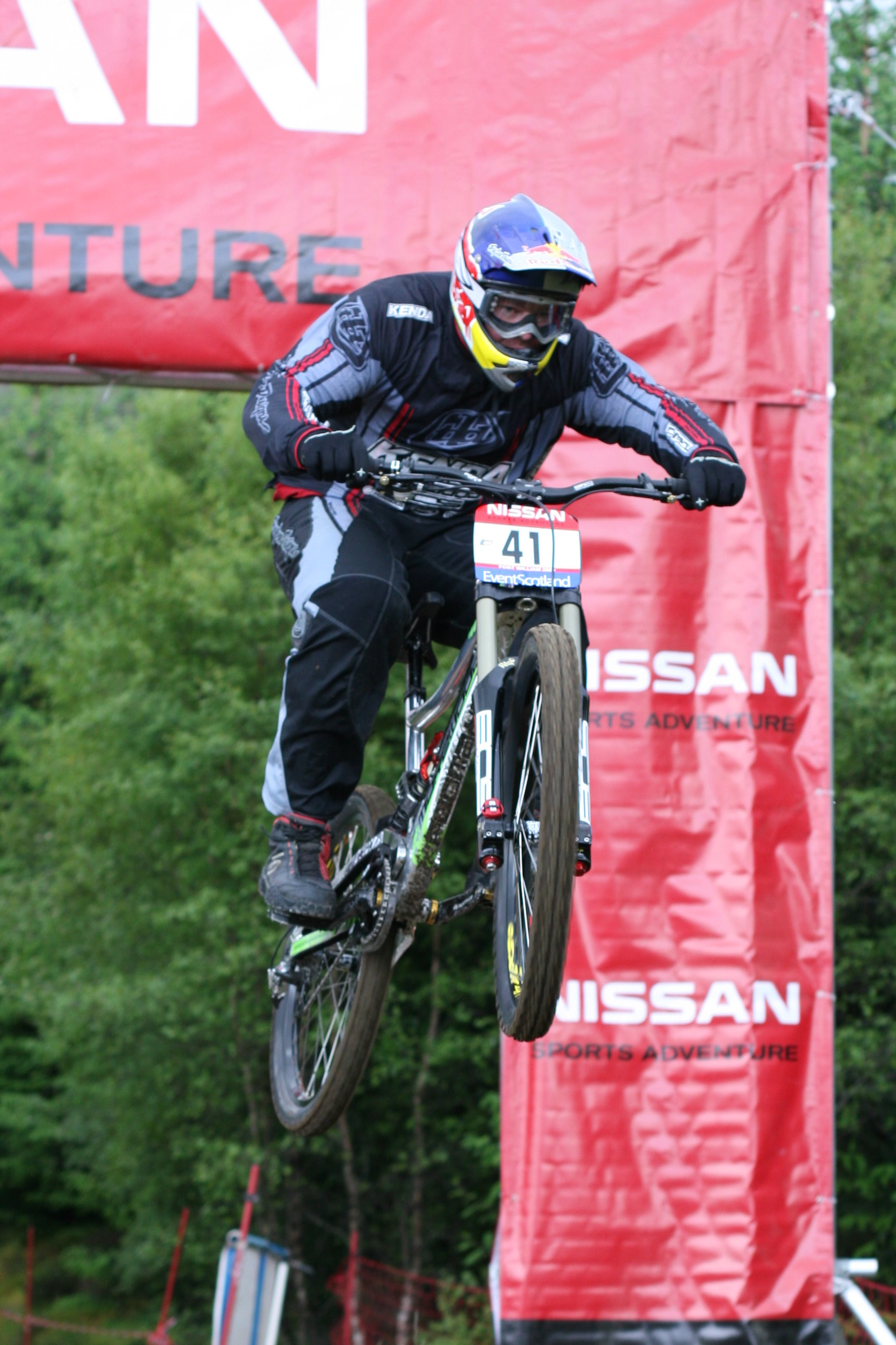 Nathan Rennie à la coupe du monde de VTT 2009 à Fort William.